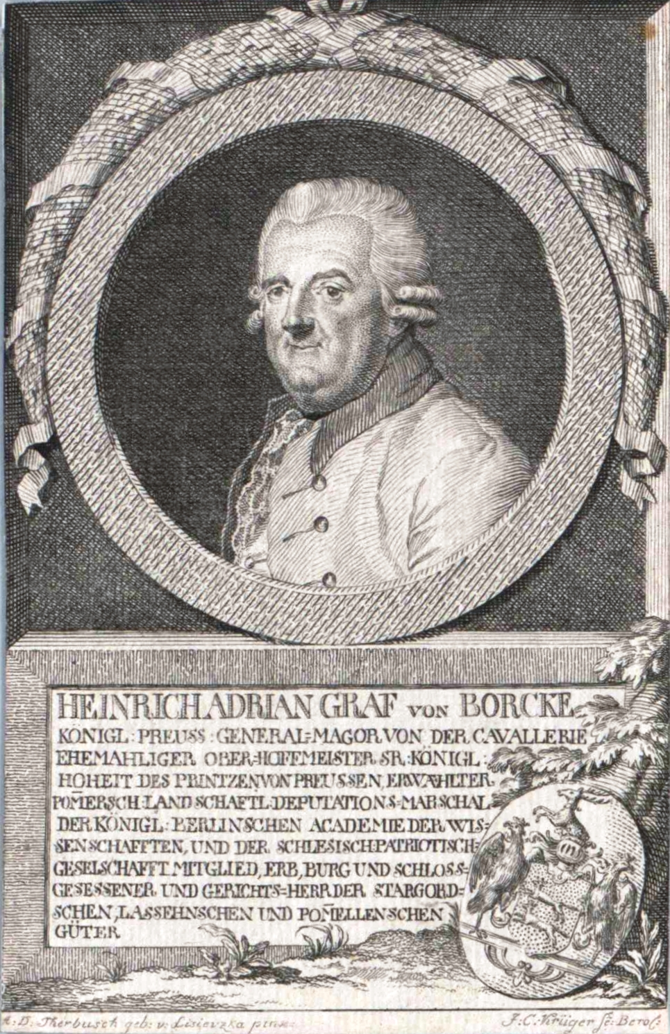 Heinrich Adrian von Borcke, zeitgenössischer Kupferstich